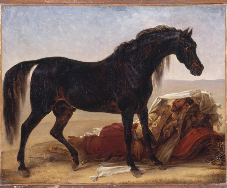 Cheval arabe ou un arabe et son coursier